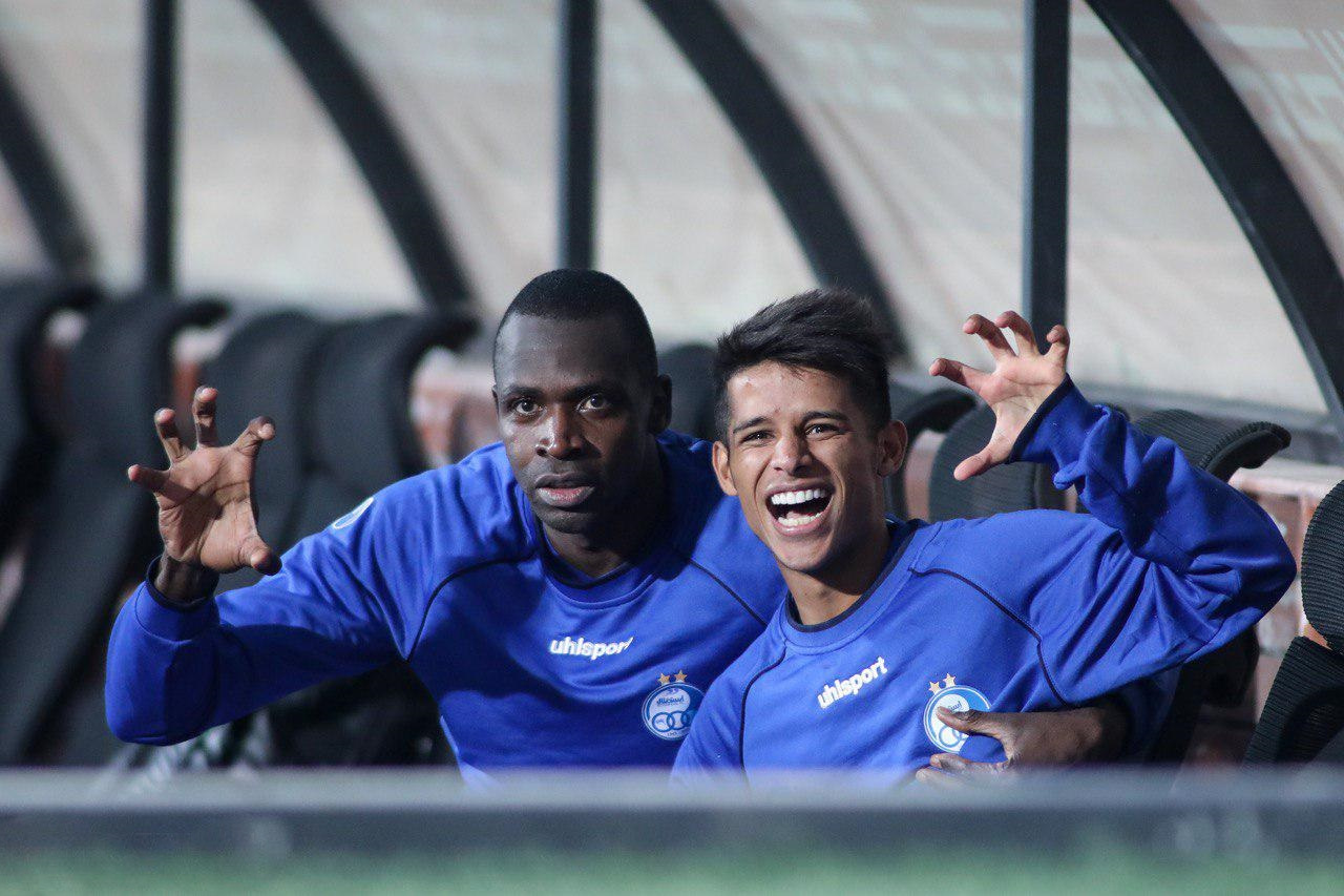 نگاره‌ای از دیدار دو تیم استقلال و صنعت نفت آبادان در ۱۴ آبان ۱۳۹۸ در ورزشگاه آزادی که تیم استقلال با نتیحه ۵-۰ پیروز دیدار شد. (مشاهده گزارش بازی)